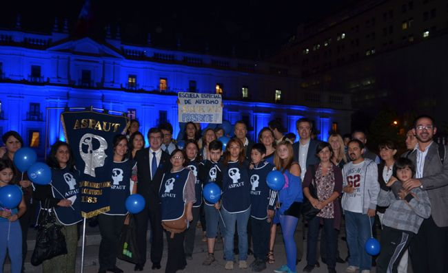 Ministro Lavín y Directora Senadis junto a organizaciones en Día Mundial del Autismo.